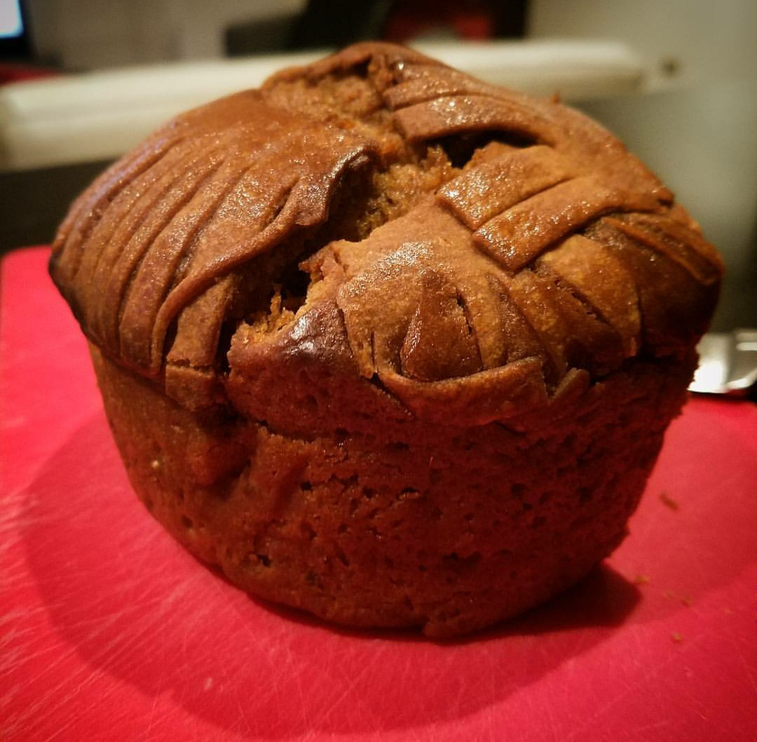 Versión jpg del archivo Archivo:Pan bon CR.png